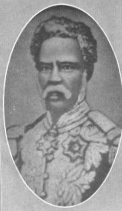 Portrait du président haïtien Nissage Saget